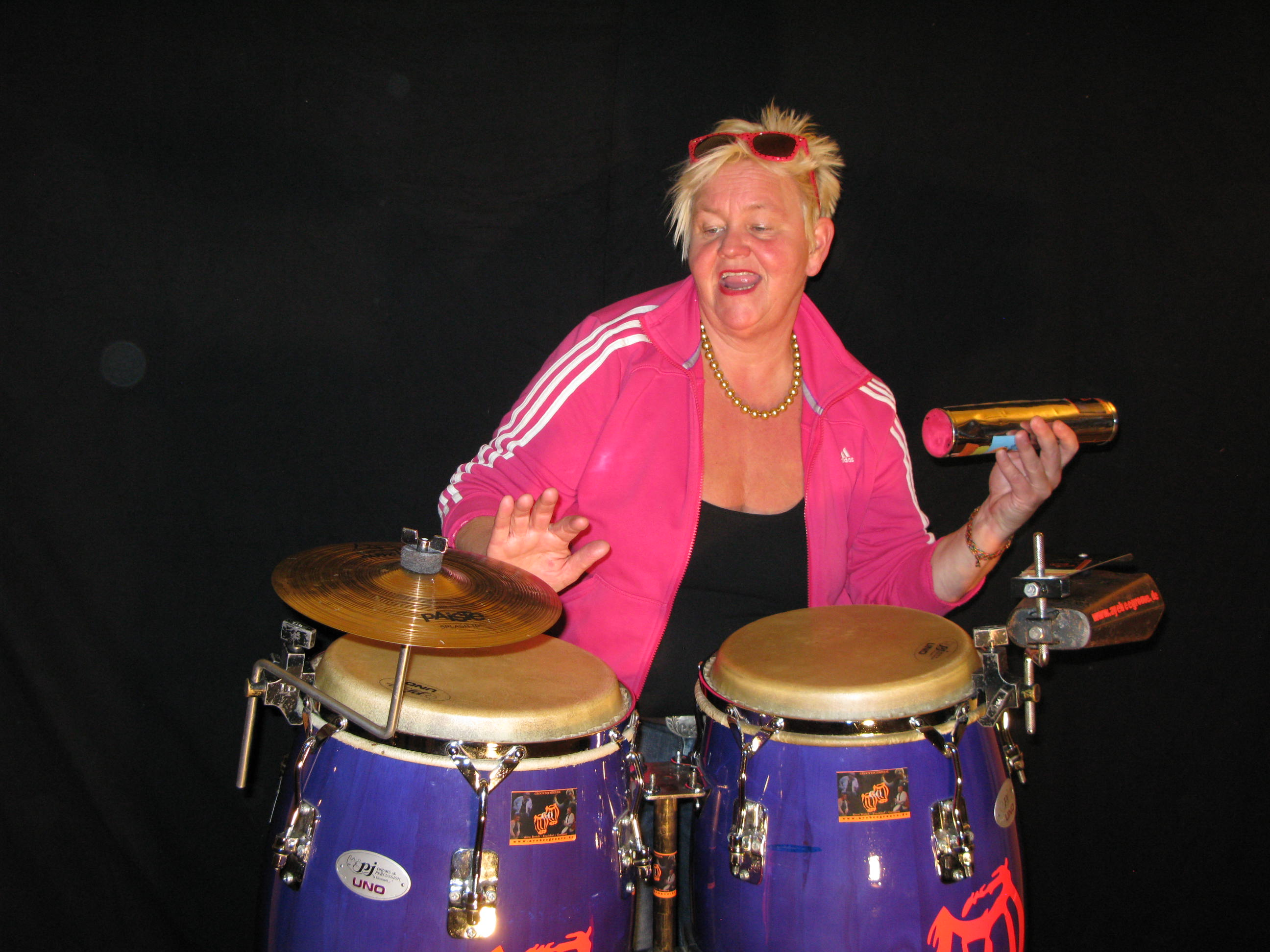 Anne Breick beim Auftritt